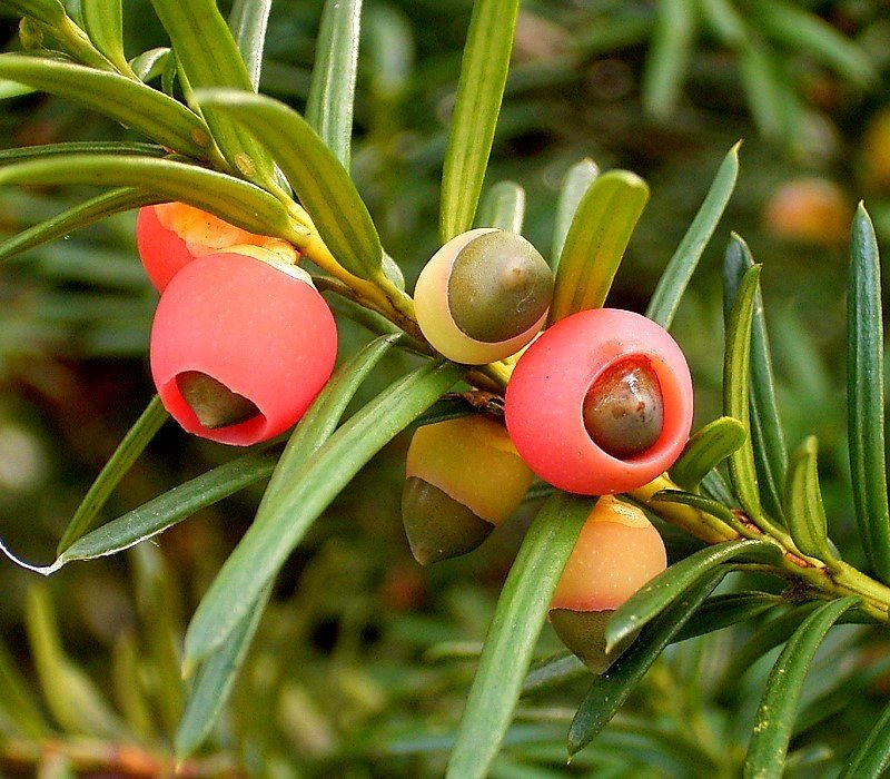 Taxus baccata